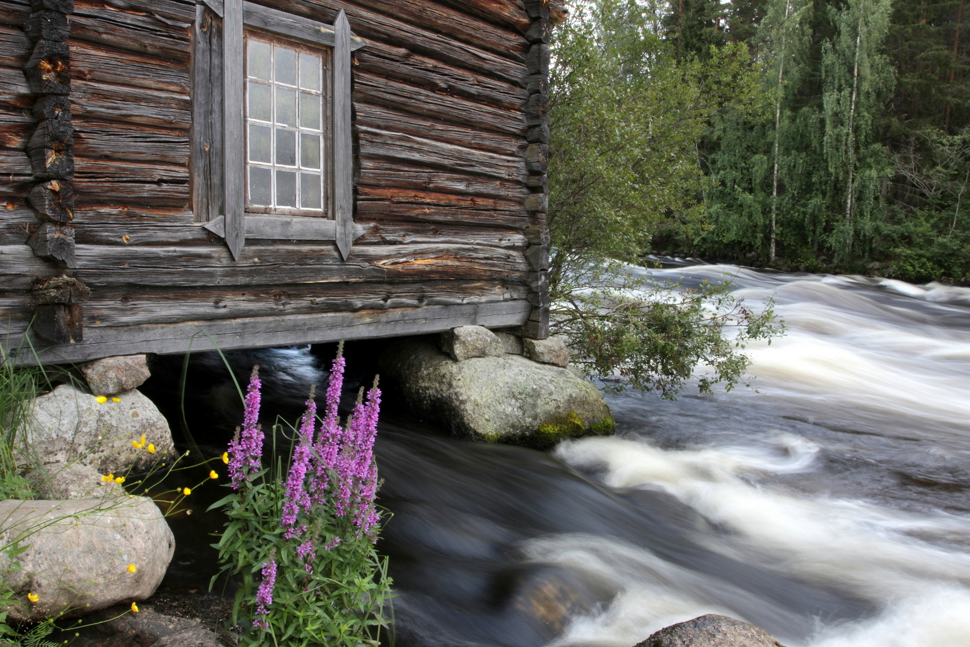 Rantakukka ja lahkomylly Kapeenkosken rannalla Äänekoskella